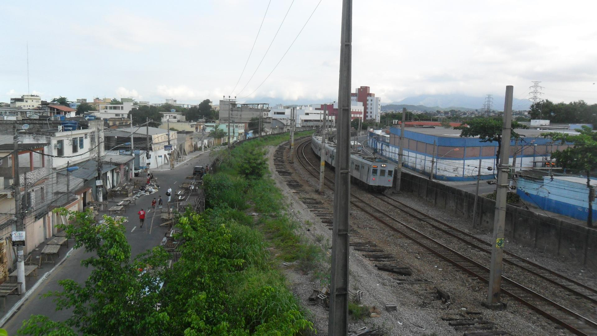 Divisa entre Jardim 25 de Agosto e Centro de Caxias